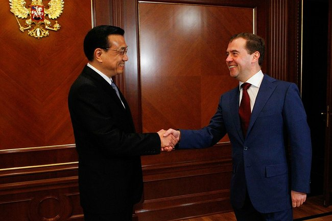 С Заместителем Премьера Государственного Совета Китайской Народной Республики Ли Кэцяном.